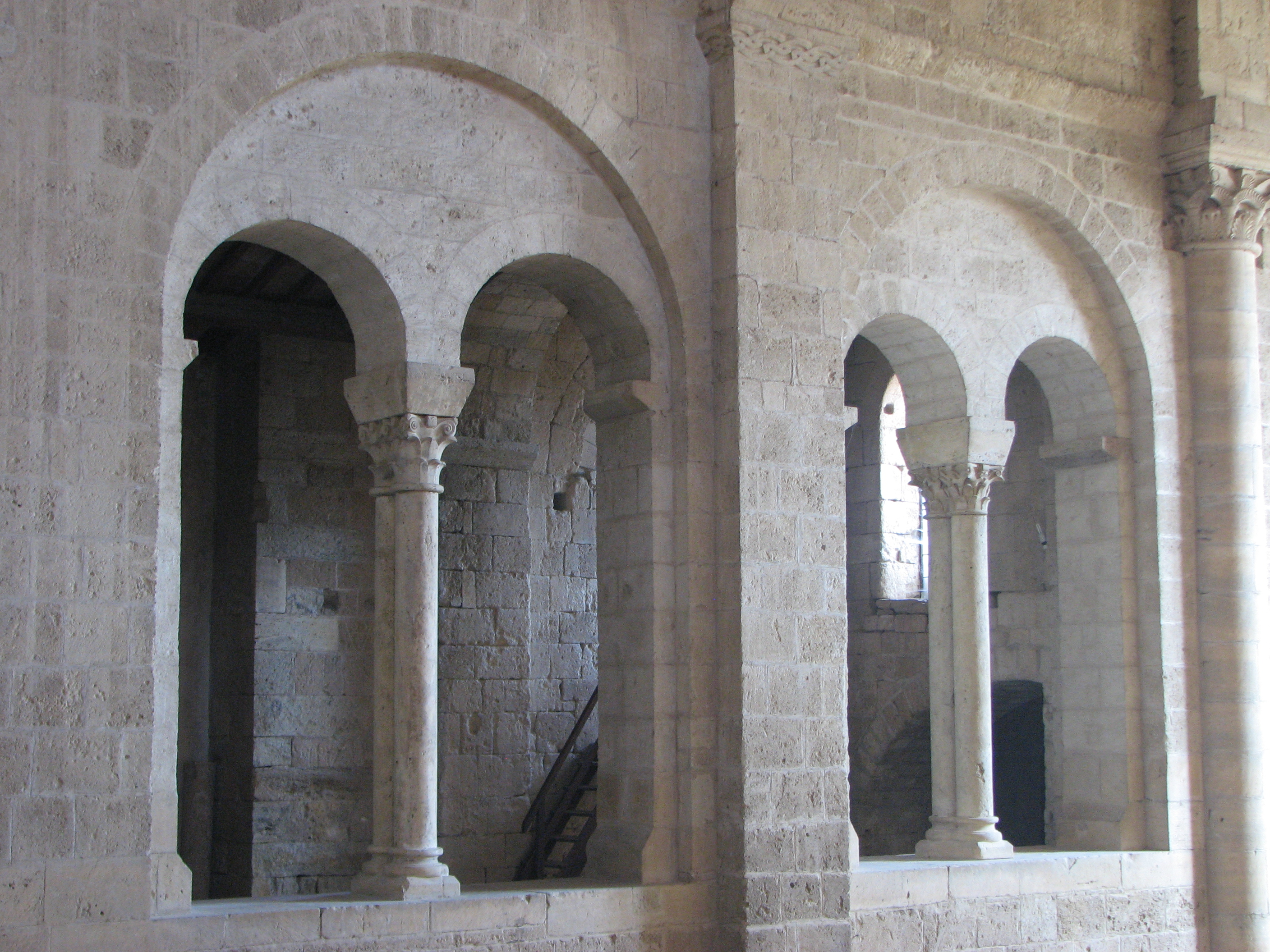 L'Abbazia di Sant'Antimo (Montalcino, Toscana, Italy) - Archi del matroneo